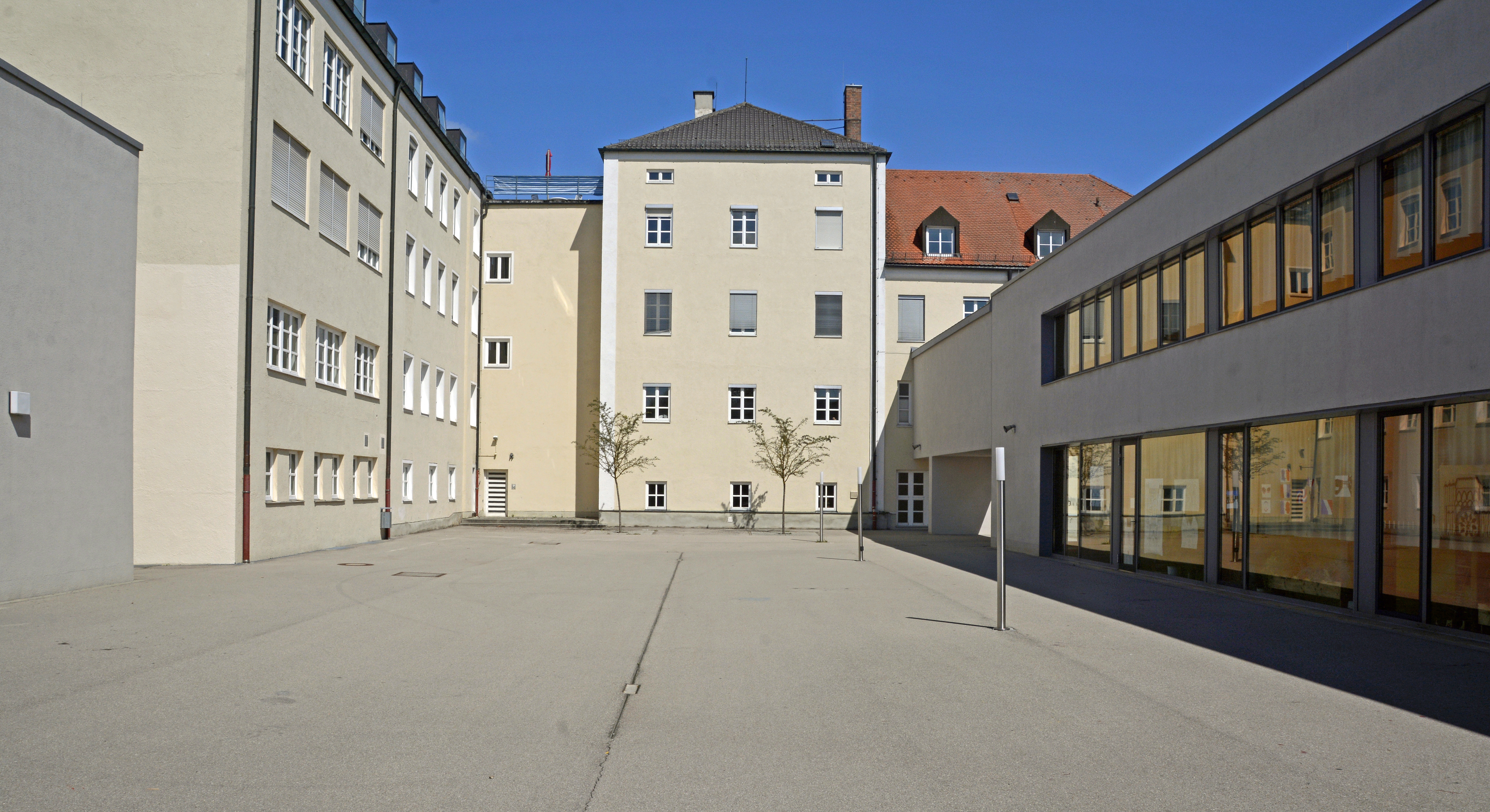 Erzbischöfliche Theresia-Gerhardinger-Realschule Weichs (TGRS) - Schulhof